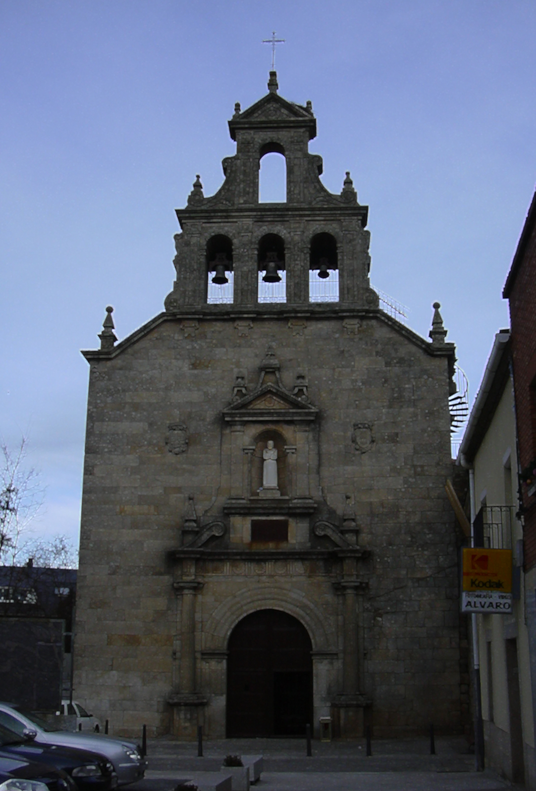 La iglesia de Alcañices, provincia de Zamora, España.